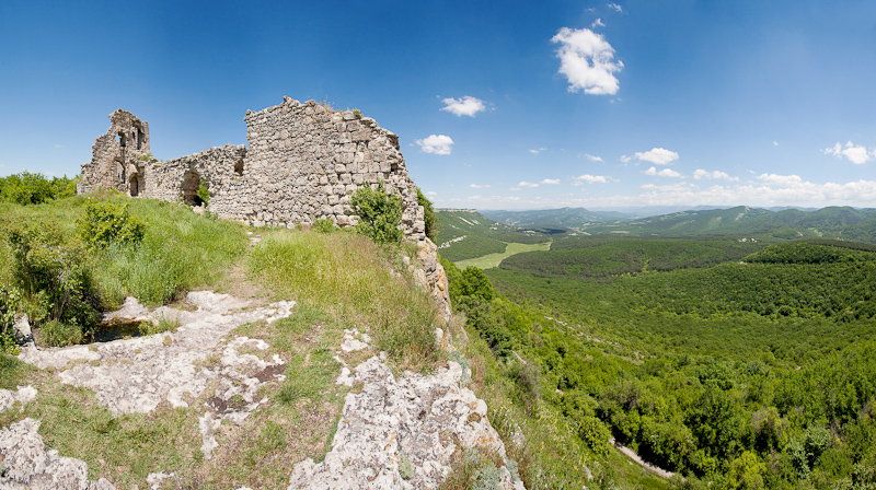 Гора останец «Мангуп-Кале»